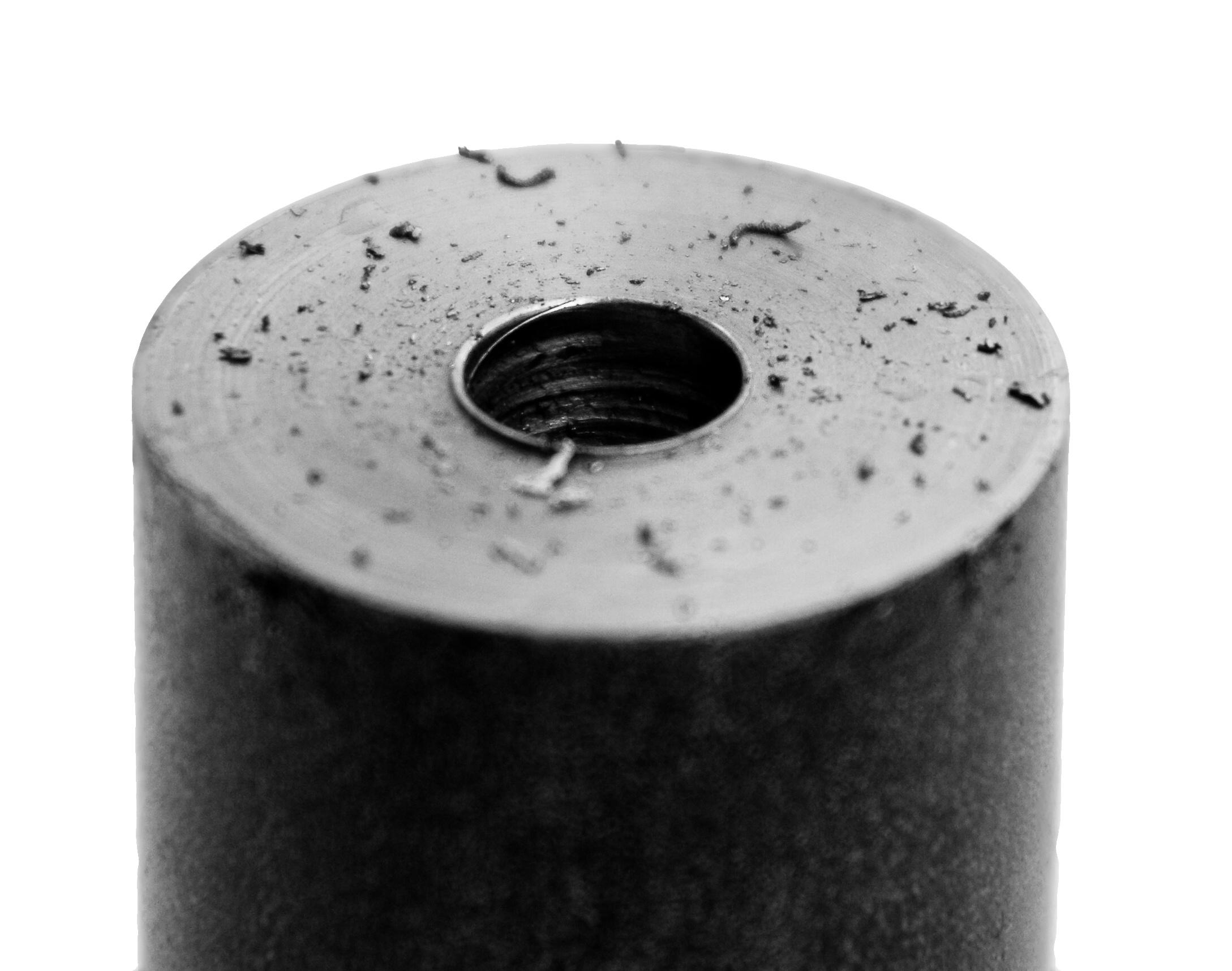 otřep vzniklý po vrtání